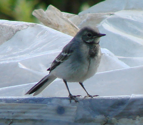 Трясогузка